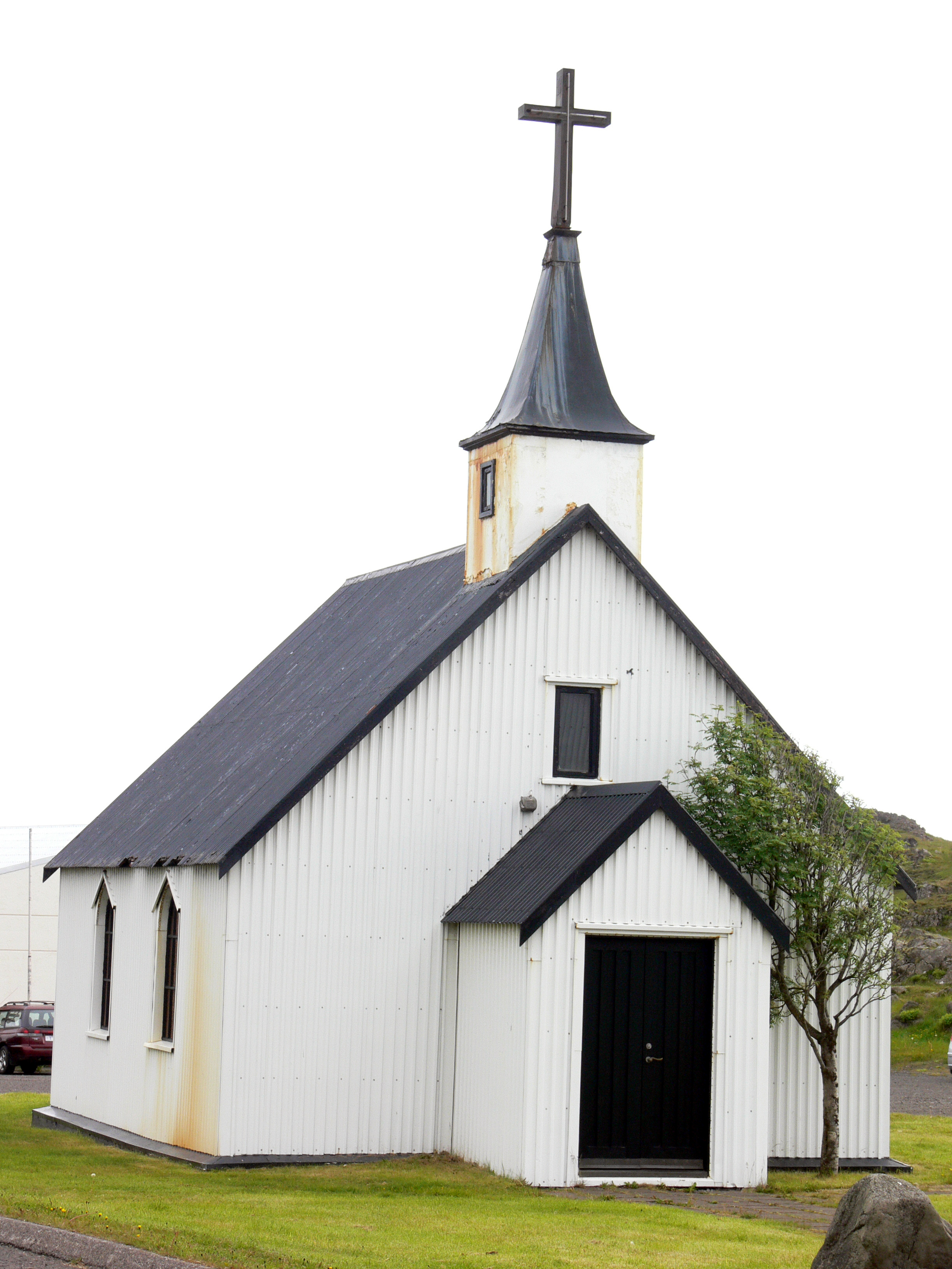 Alte Kirche von Djúpivogur